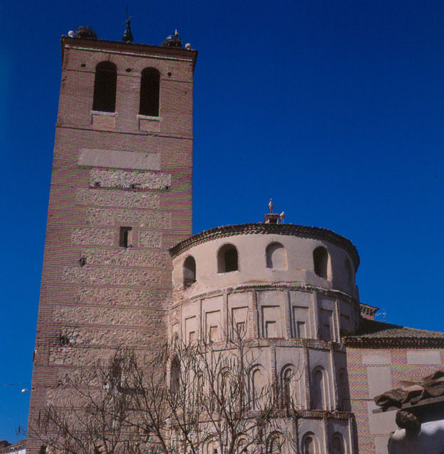 Iglesia de Santa María - Mojados (Valladolid) - Diapositiva 48 x 48 Color